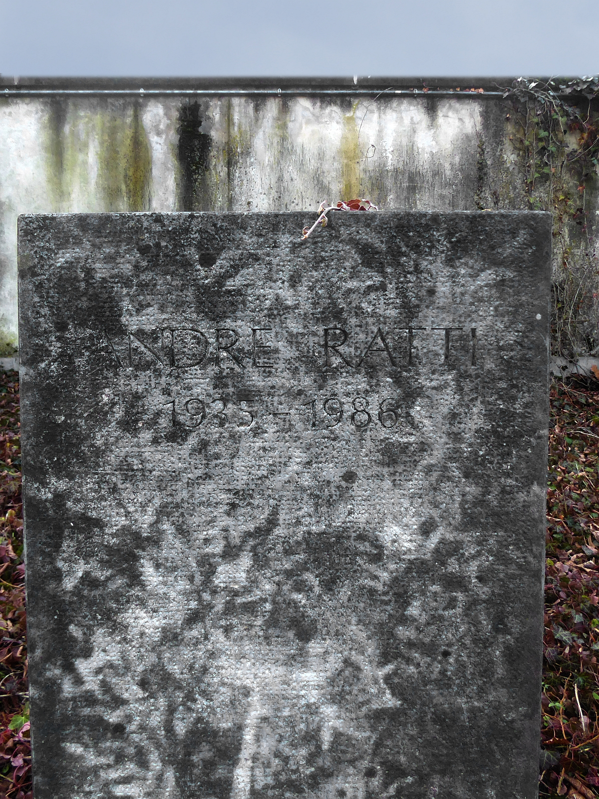 André Ratti (1935–1986) Lektor, Journalist, Moderator und Redaktor beim Schweizer Fernsehen (SRF), erster Präsident der Aids-Hilfe Schweiz. Ehrengrab auf dem Friedhof Hörnli, Riehen, Basel-Stadt